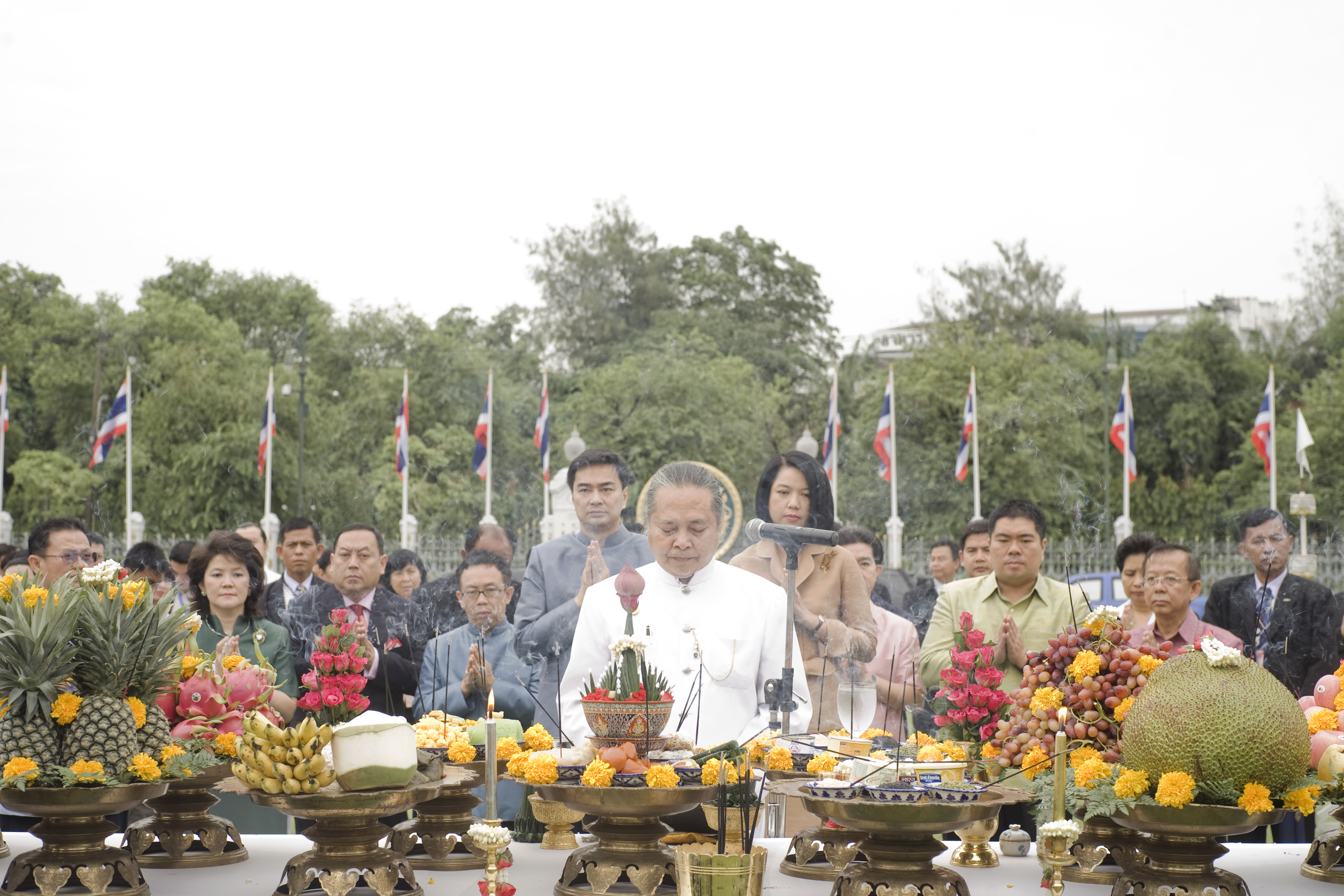 คณะรัฐบาลจะทำบุญ 5 ศาสนาเพื่อความเป็นสิริมงคลแก่ประเทศไทย นายกรัฐมนตรีเป็นประธานประกอบพิธีทางศาสนา 5 ศาสนา ประกอบด้วย พุทธ อิสลาม คริสต์ ฮินดู ซิกข์ เพื่อความเป็นสิริมงคลแก่ประเทศไทย ณ สนามหญ้าหน้าตึกไทยคู่ฟ้า ทำเนียบรัฐบาล วันที่ 10 มิถุนายน 2553 (The Official Site of The Prime Minister of Thailand Photo by พีรพัฒน์ วิมลรังครัตน์)